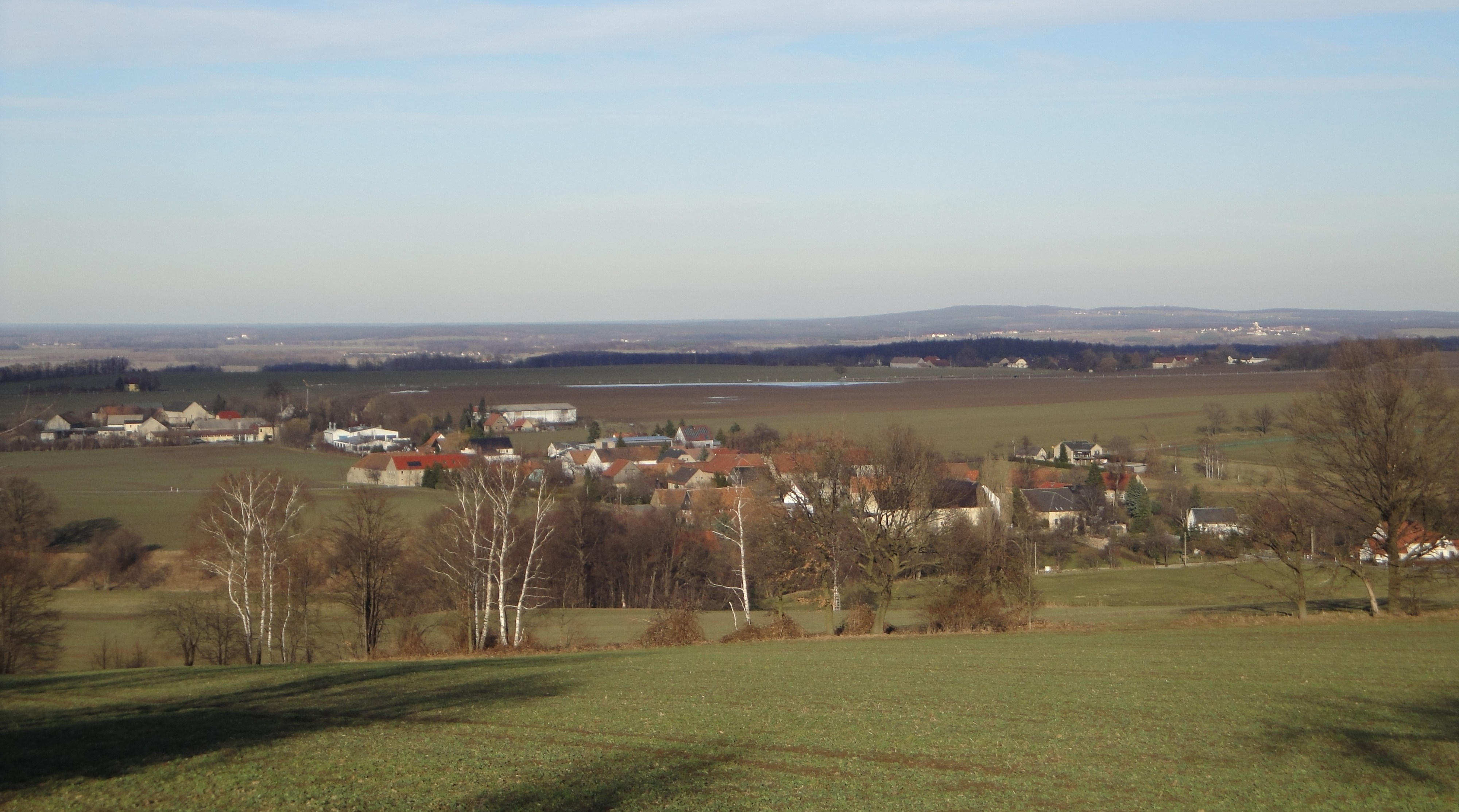 Blick auf Soritz und Scheckwitz, Gemeinde Kubschütz, Landkreis Bautzen. Hornjoserbsce: Wid do Sowrjec a Šekec, gmejna Kubšicy, wokrjes Budyšin.